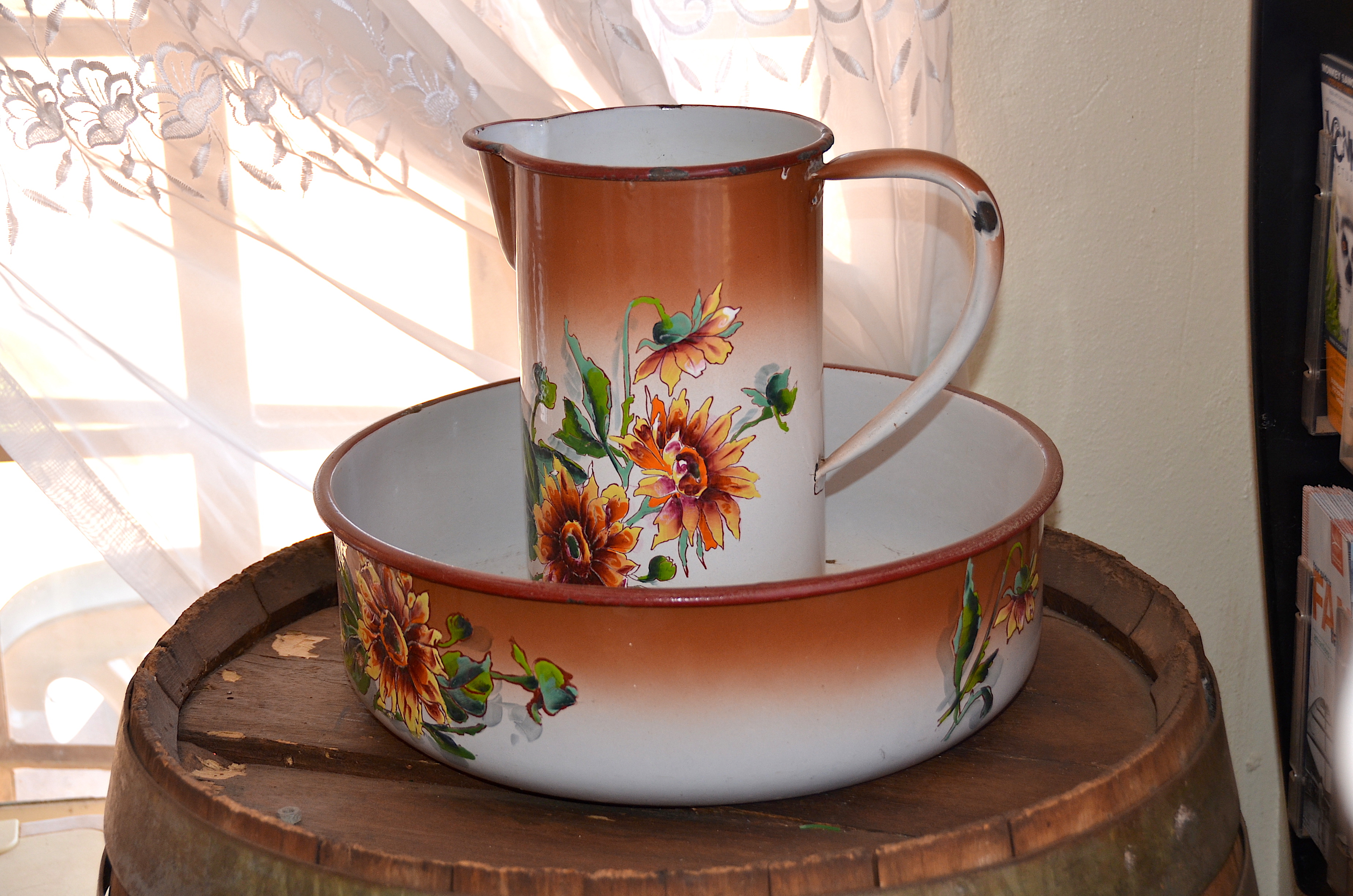 Emaille Waschschüssel mit Wasserkanne in Südafrika